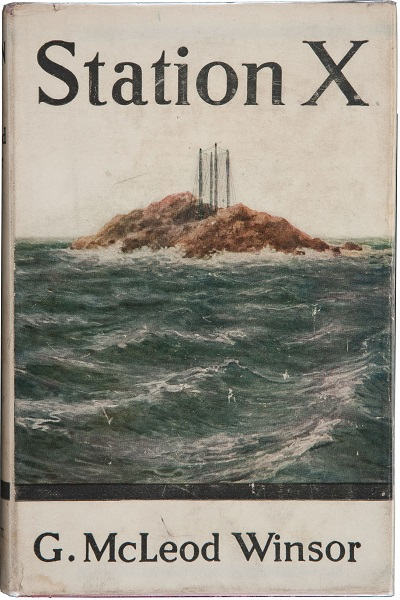 cubierta de la 1ª edición USA de 1919